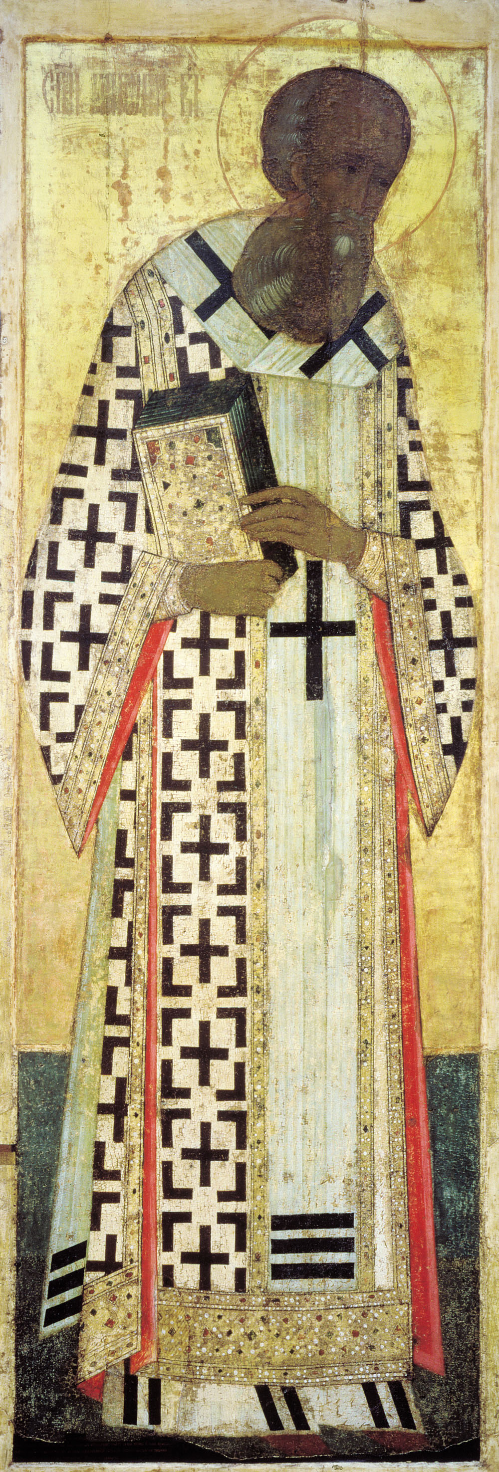 Григорий Богослов Школа или худ. центр: Москва 1408 г. 314 × 106 см Государственная Третьяковская галерея, Москва, Россия Инв. 19725 Из деисусного чина Успенского собора во Владимире